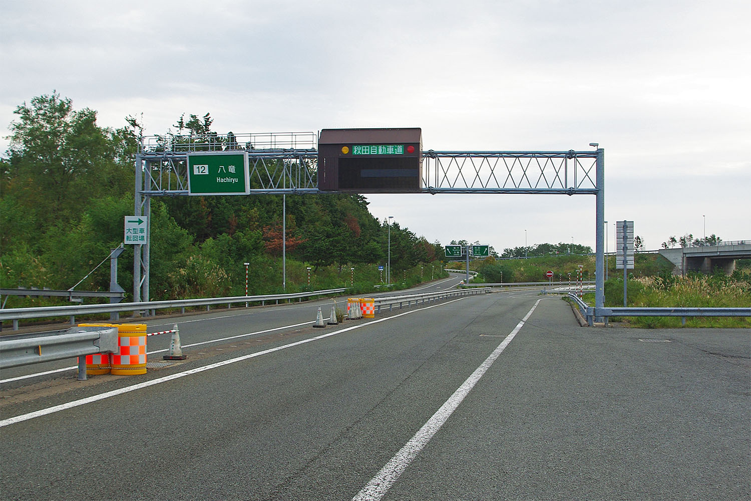 秋田自動車道 八竜インターチェンジ